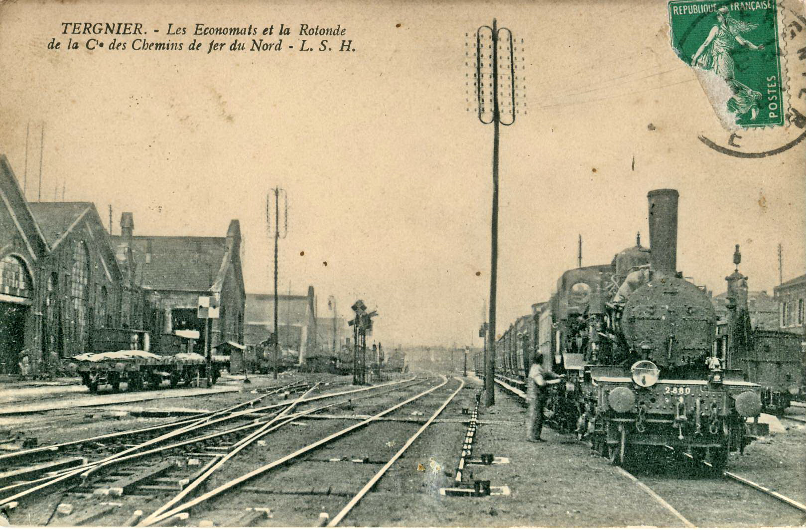 Carte postale ancienne éditée par LSH